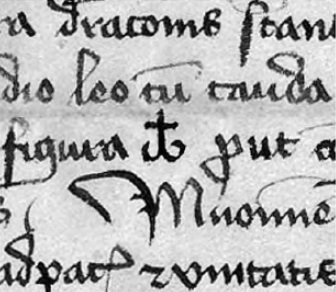 Фрагмент тэксту трансумпта Салінскага дагавора, зробленага ў 1419 г., з перамалёўкай знака пячаткі старадубскага князя Аляксандра Патрыкеевіча. Пергамін. GStAPK, Perg.-Urk. Schiebl. 53, Nr. 2